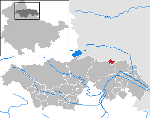 Borxleben in Thuringia - Kyffhäuserkreis